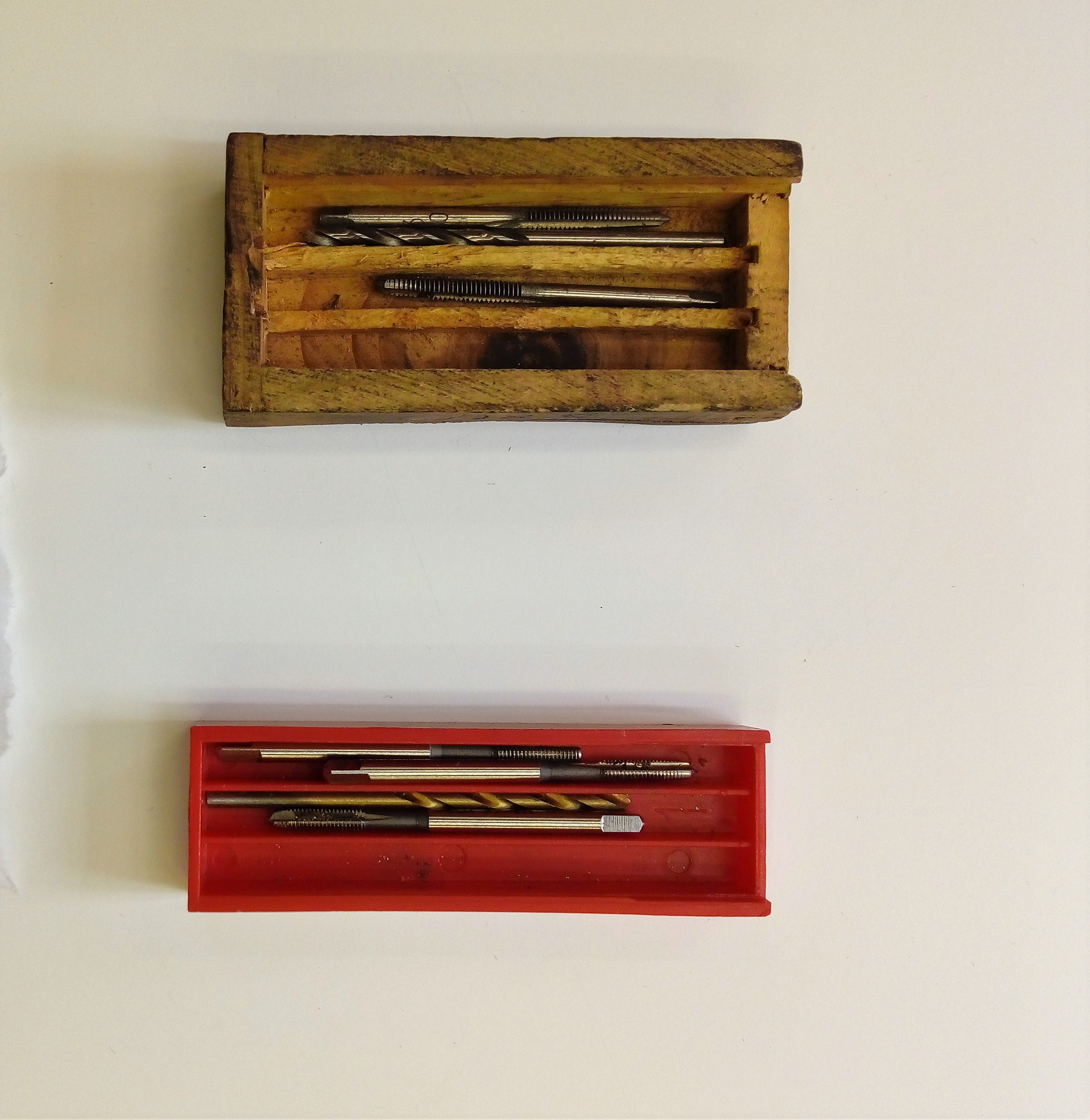 Tarauds utilisés après perçage pour tarauder un trou, c'est-à-dire créer la contre-forme d'une tige filetée